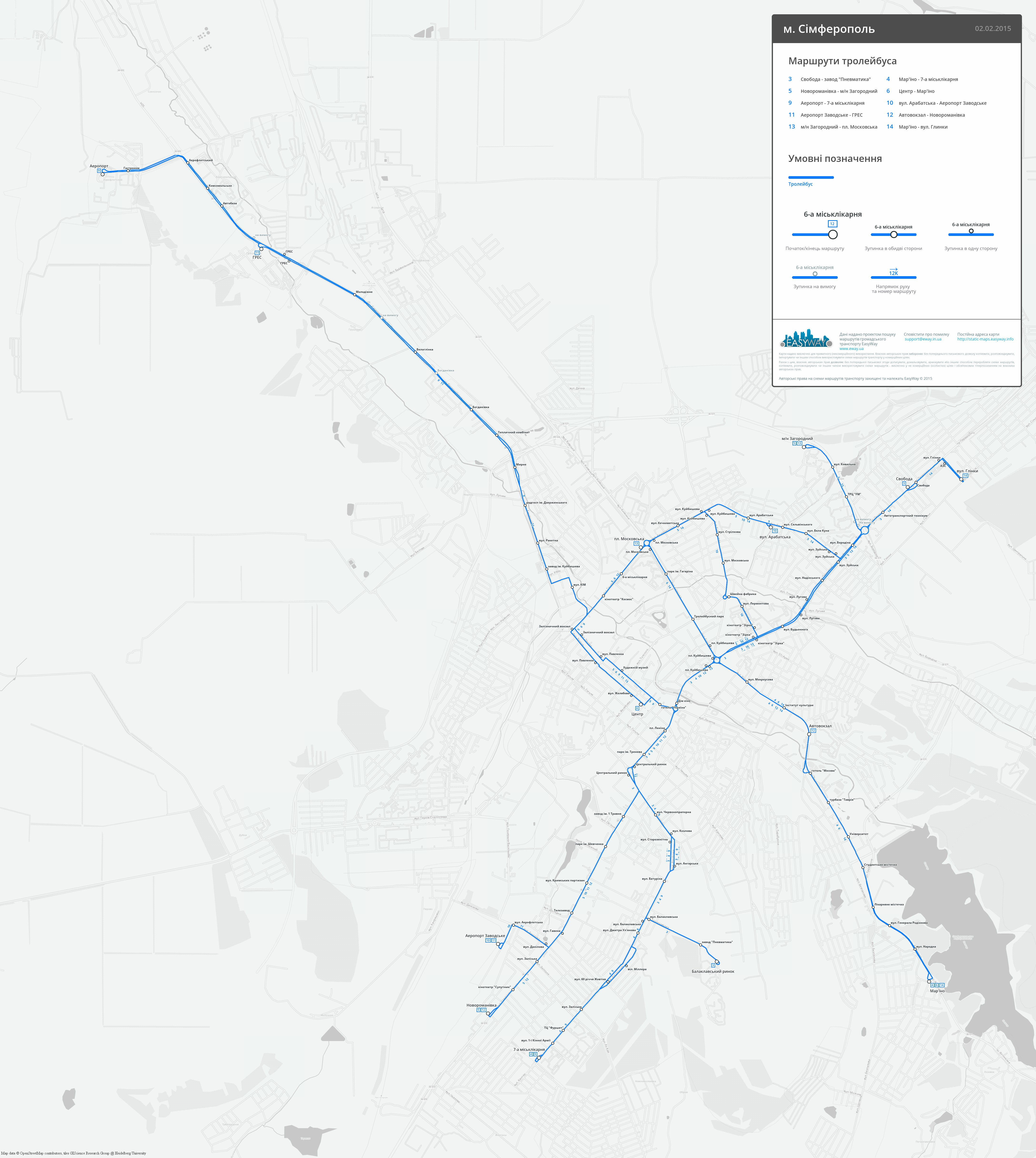 Схема тролейбусних маршрутів міста Сімферополь